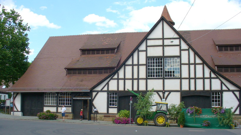 Stuttgart-Uhlbach Weinbaumuseum Selbst fotografiert von User:Enslin Am 31.7.2005 Kategorie:Stuttgart